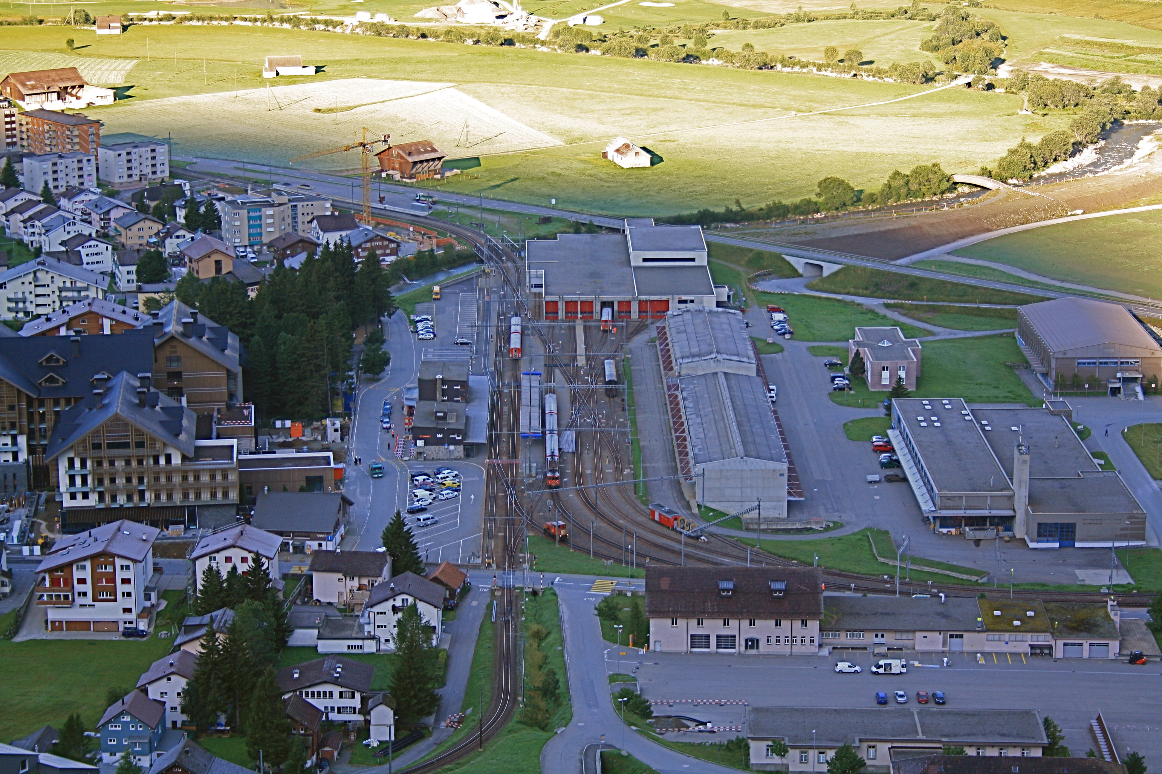 Bahnhof Andermatt an der Matterhorn Gotthard Bahn von der Bahnstrecke nach Disentis aus gesehen. Der Bahnhof Andermatt ist Knotenpunkt der Bahnlinien nach Göschenen, Brig/Zermatt sowie Disentis.